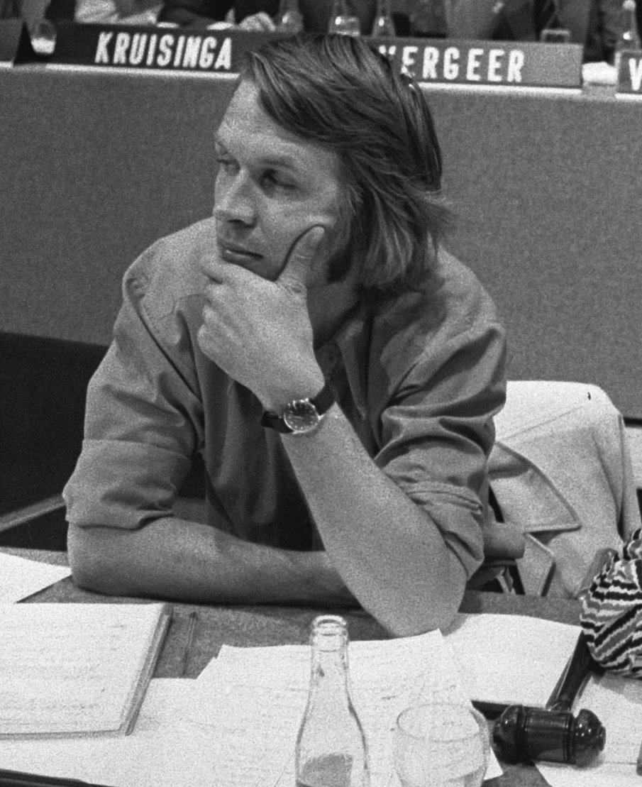 Collectie / Archief : Fotocollectie Anefo Reportage / Serie : Het eerste CDA-congres te Den Haag Beschrijving : Mevrouw Haars Datum : 23 augustus 1975 Locatie : Den Haag, Zuid-Holland Trefwoorden : congressen, politici, politieke partijen Persoonsnaam : Haars, E.A. Fotograaf : Fotograaf Onbekend / Anefo Auteursrechthebbende : Nationaal Archief Materiaalsoort : Negatief (zwart/wit) Nummer archiefinventaris : bekijk toegang 2.24.01.05 Bestanddeelnummer : 928-1178